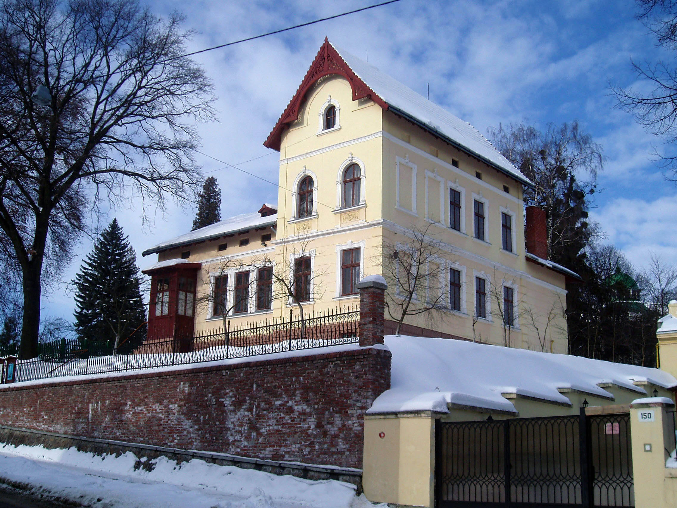 Будинок № 152 на вулиці Франка у Львові. Архітектор Мартин Заходний (1869-1910). Нині Літературно-меморіальний музей Івана Франка.